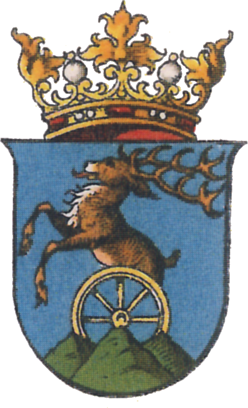 Wappen des ungarischen Komitates Pozsony (Pressburg)